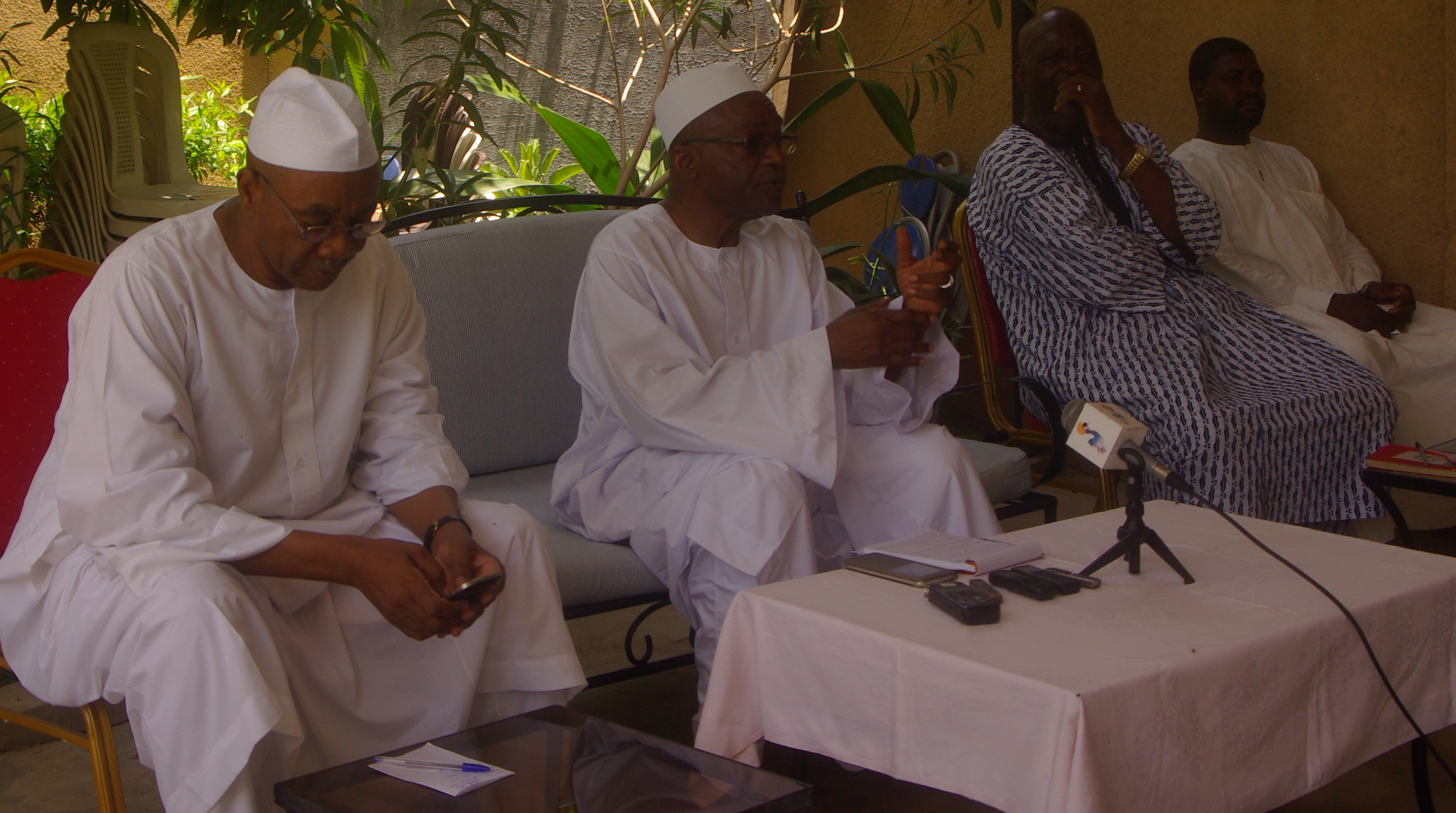 Conférence de presse de l'opposition. De gauche à droit Mahamat Al-Habo, Saleh Kezabo, N J. D. Danadji, à N’Djamena, Tchad, 7 août 2016. (VOA/André Kodmadjingar)